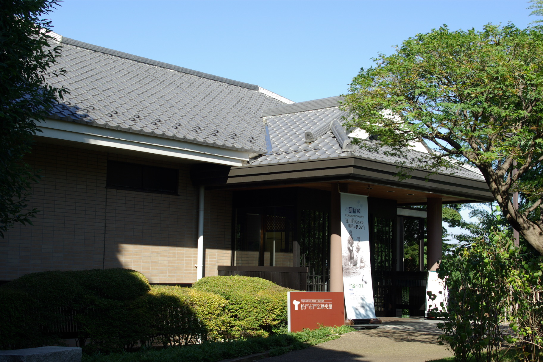 松戸の戸定歴史館